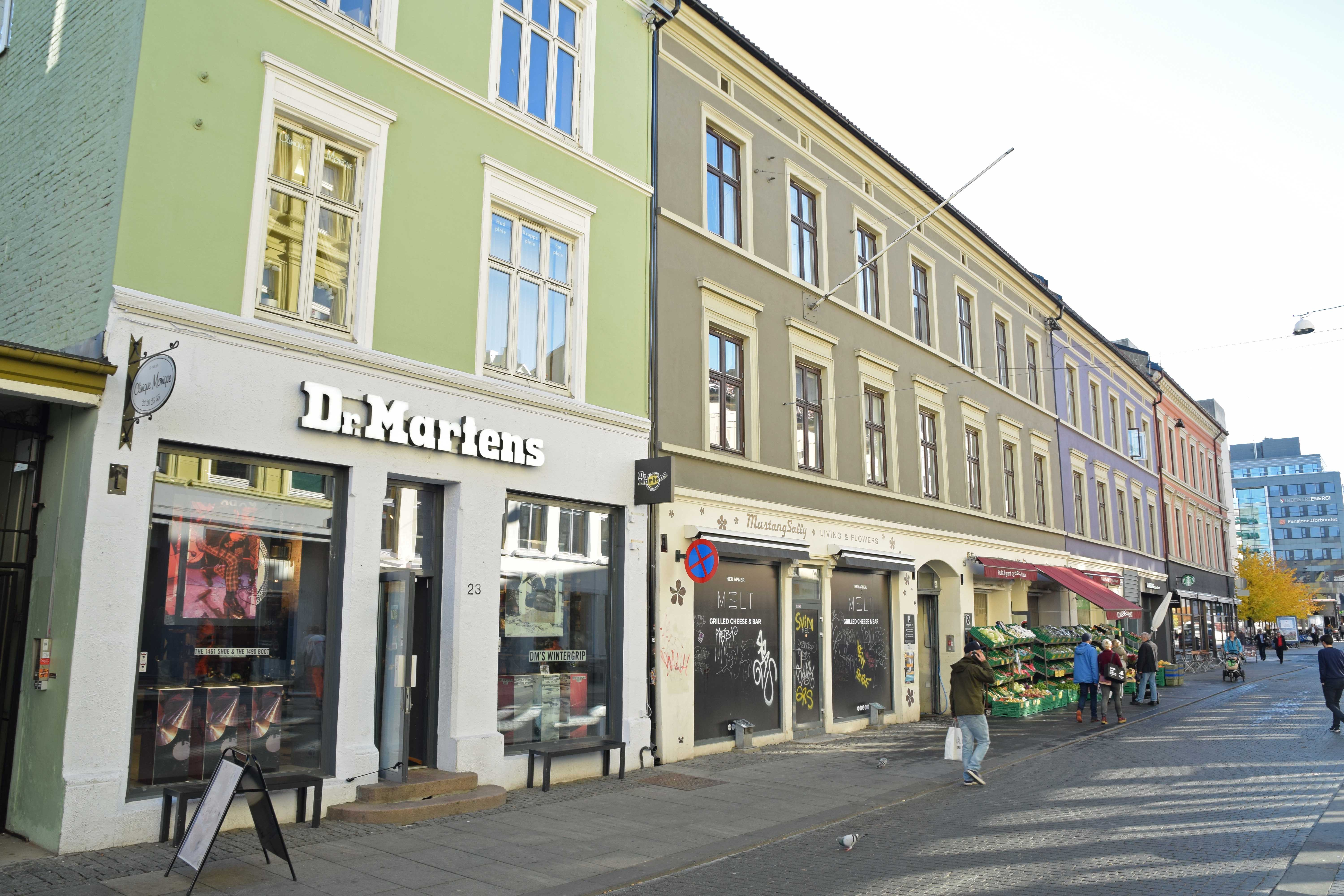 Murgårder i Torggata 23 nærmest til nr. 17